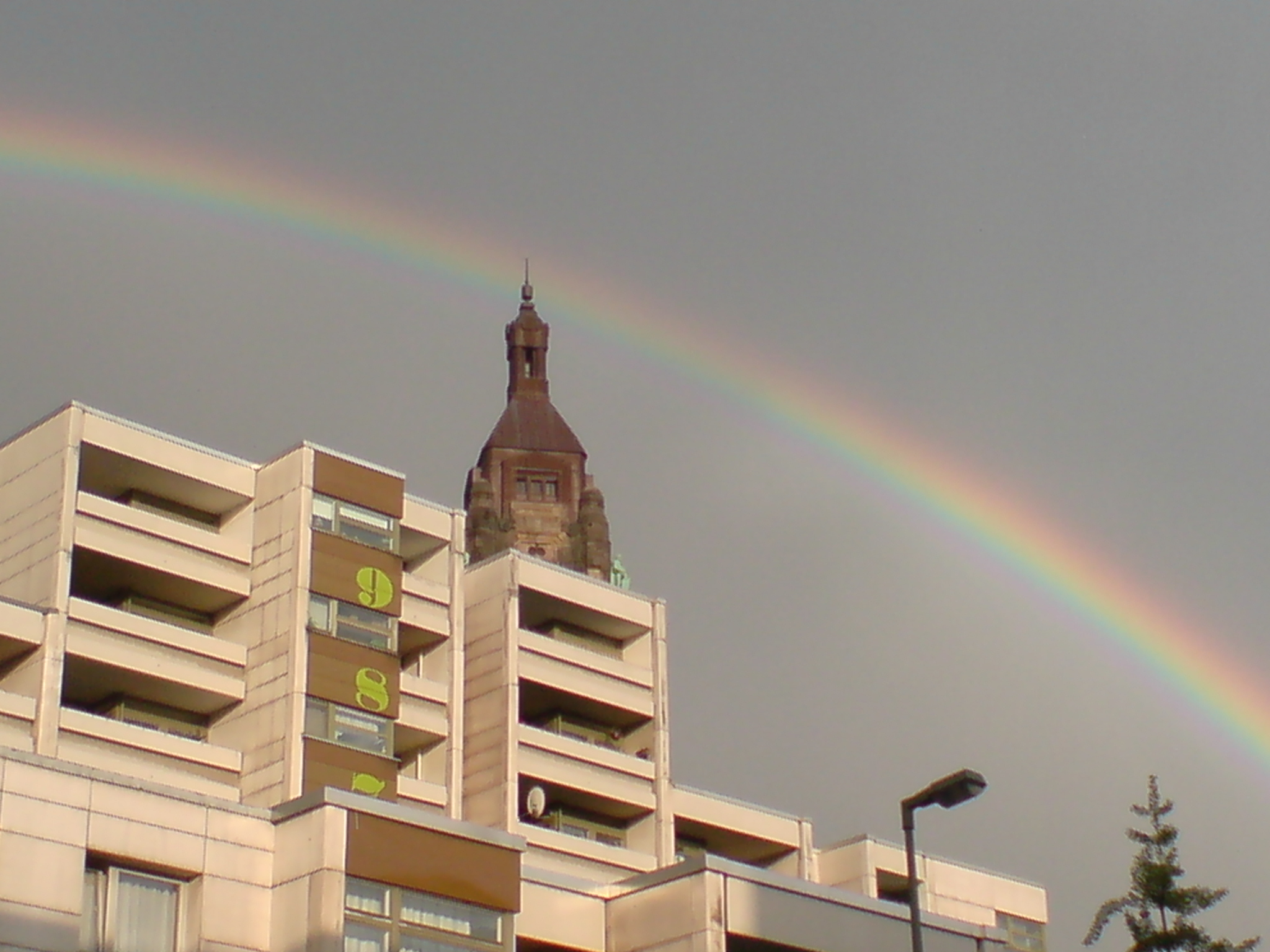 Berlin'de gökkuşağı.